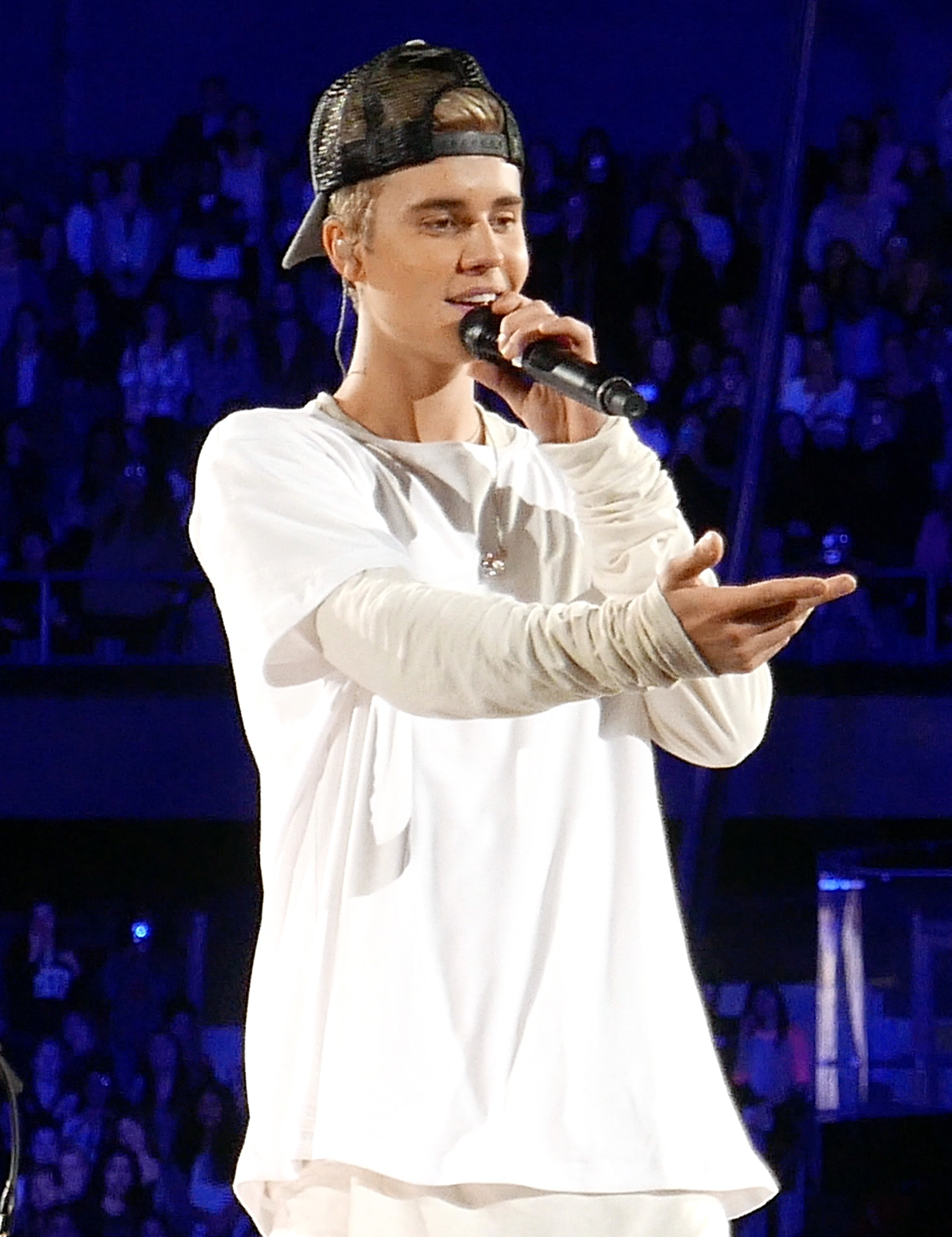 Justin Bieber durante un concierto en el Allstatae Arena en Rosemont, Illinois (2015)